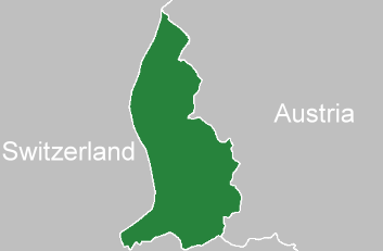 Map of Liechtenstein in closer view